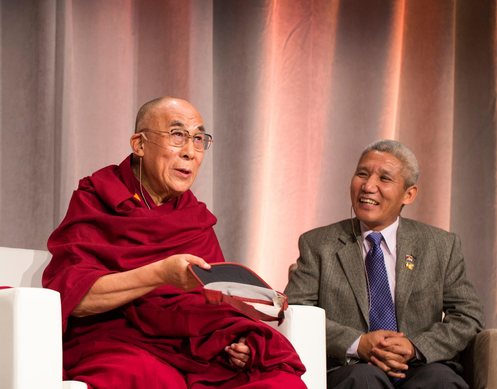 Tenzin Gyatso - 14th Dalai Lama